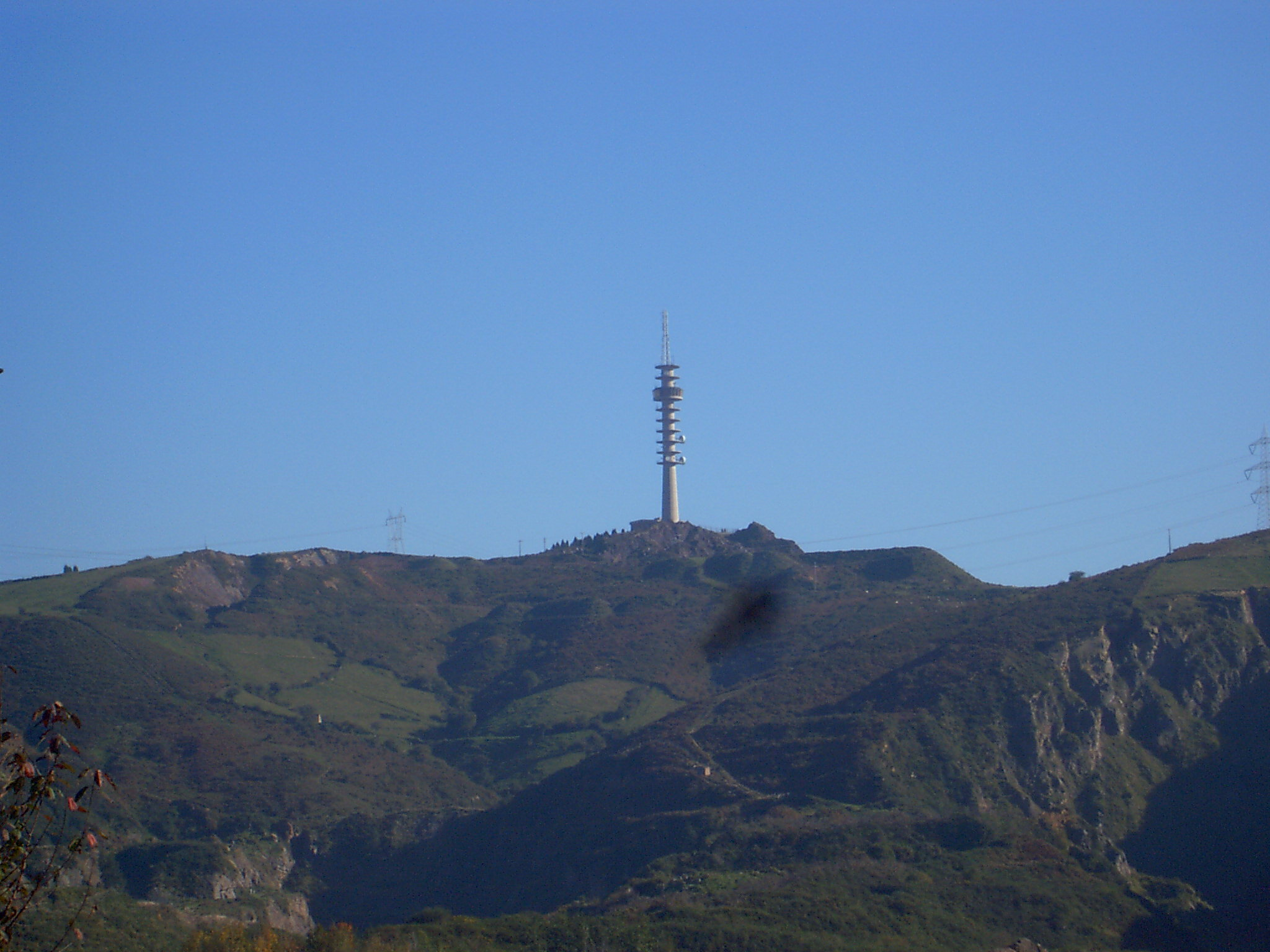 Mendibil (trapagaran) mendiaren antena